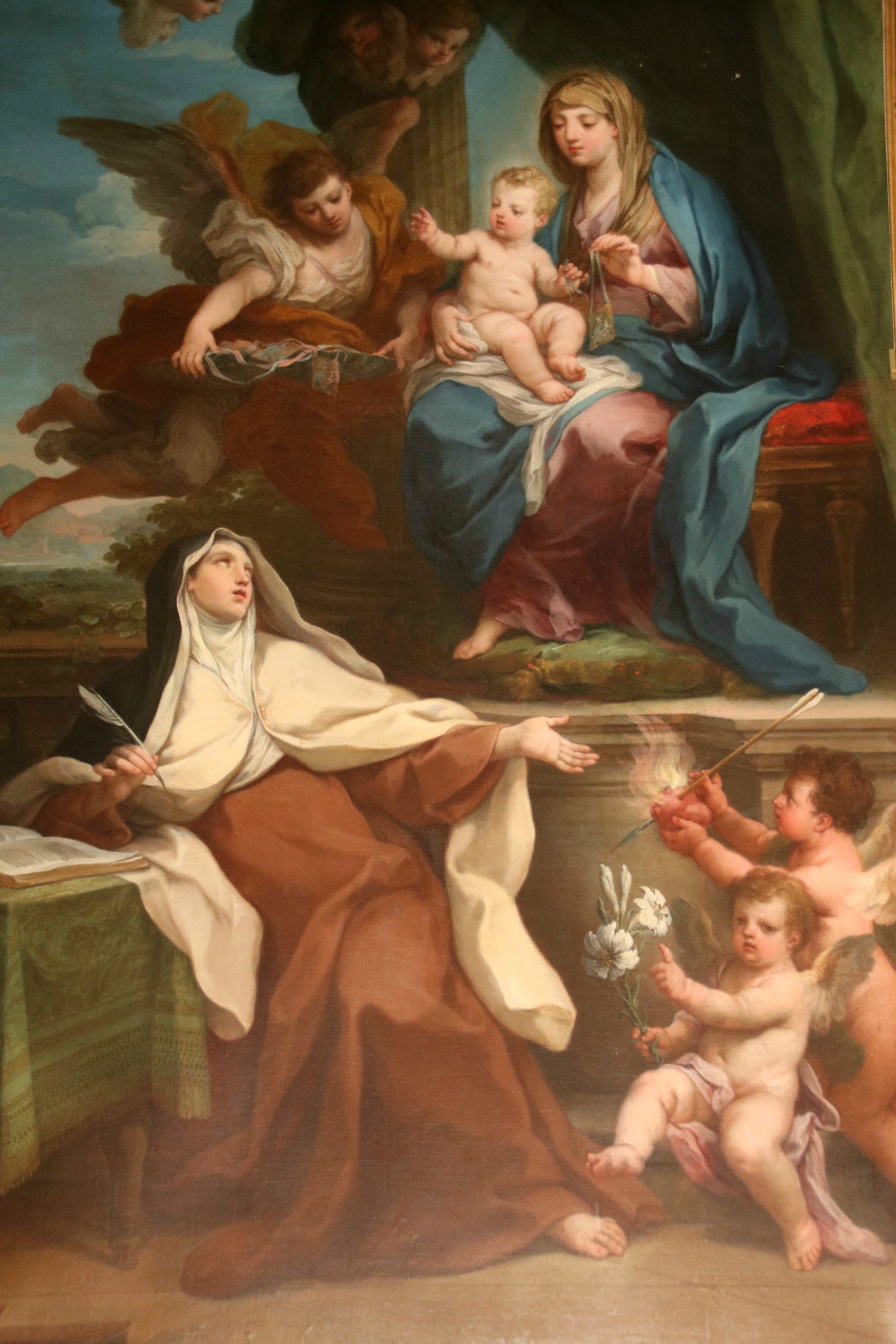 Concattedrale di Santa Maria Assunta (Cagli)